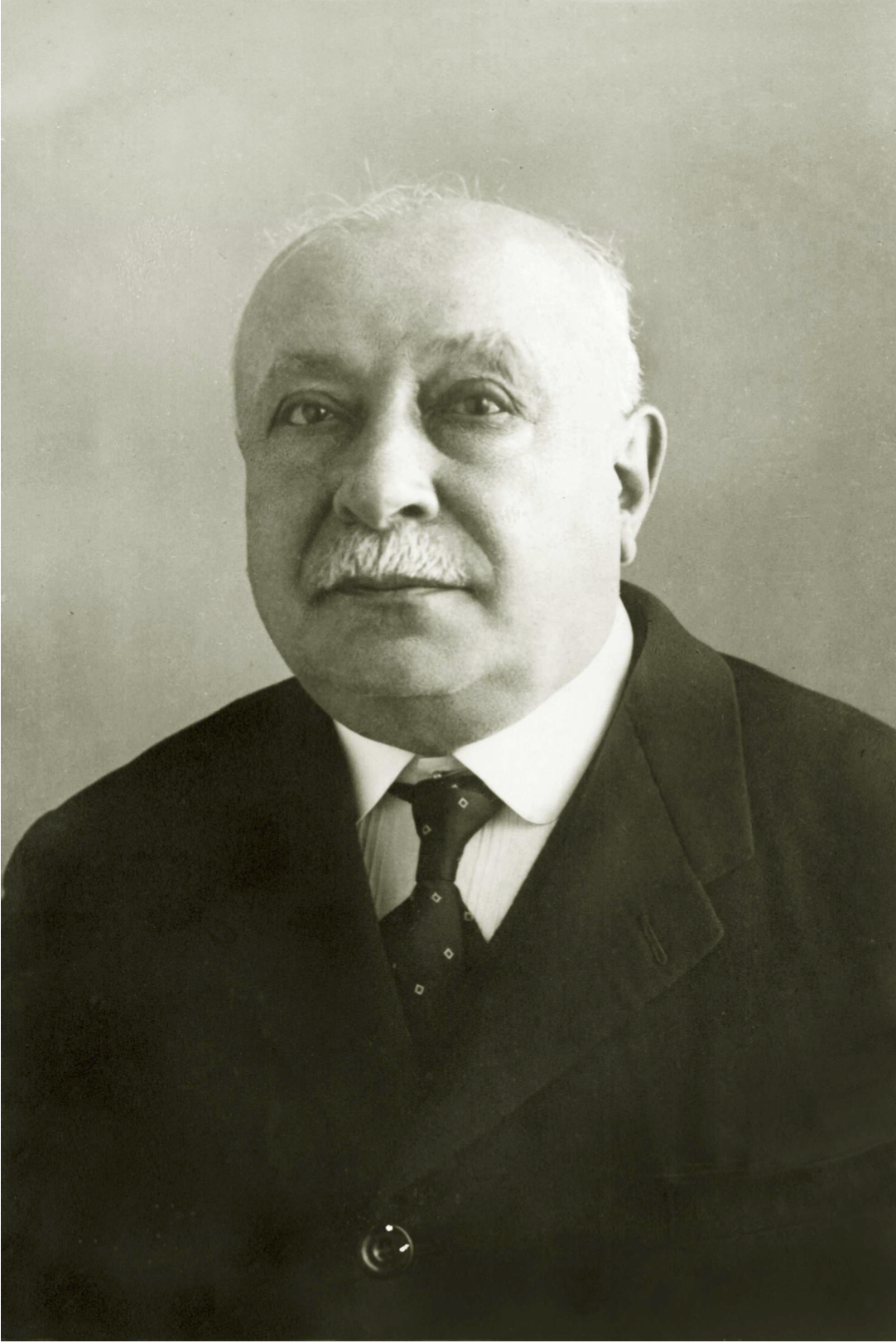 Giuseppe Carboni, professore di latino nei licei